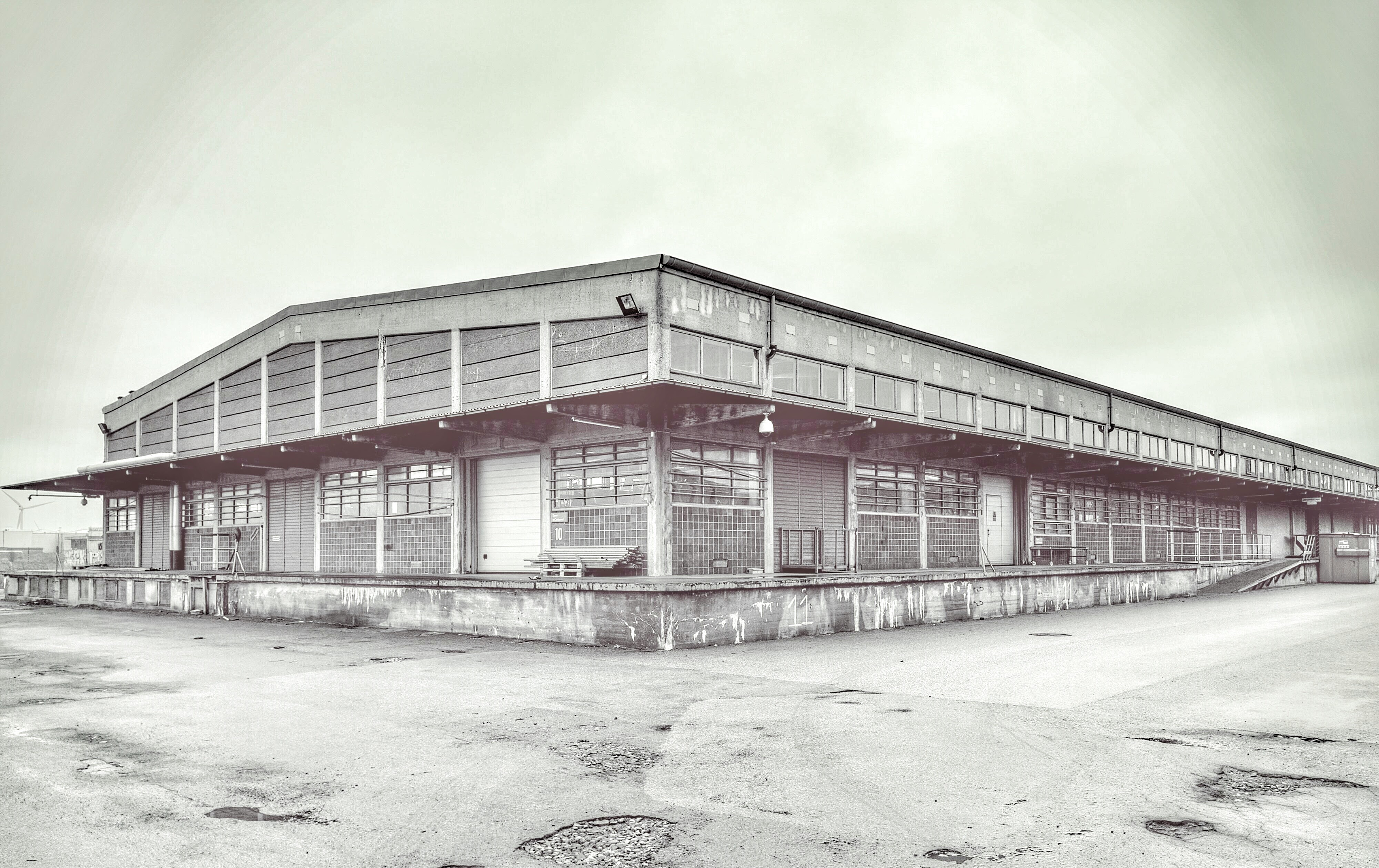 Det nye TAP1 - Amager